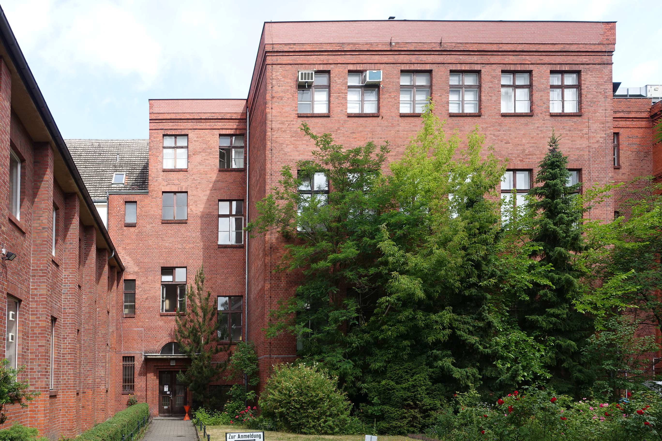 Institutsgebäude